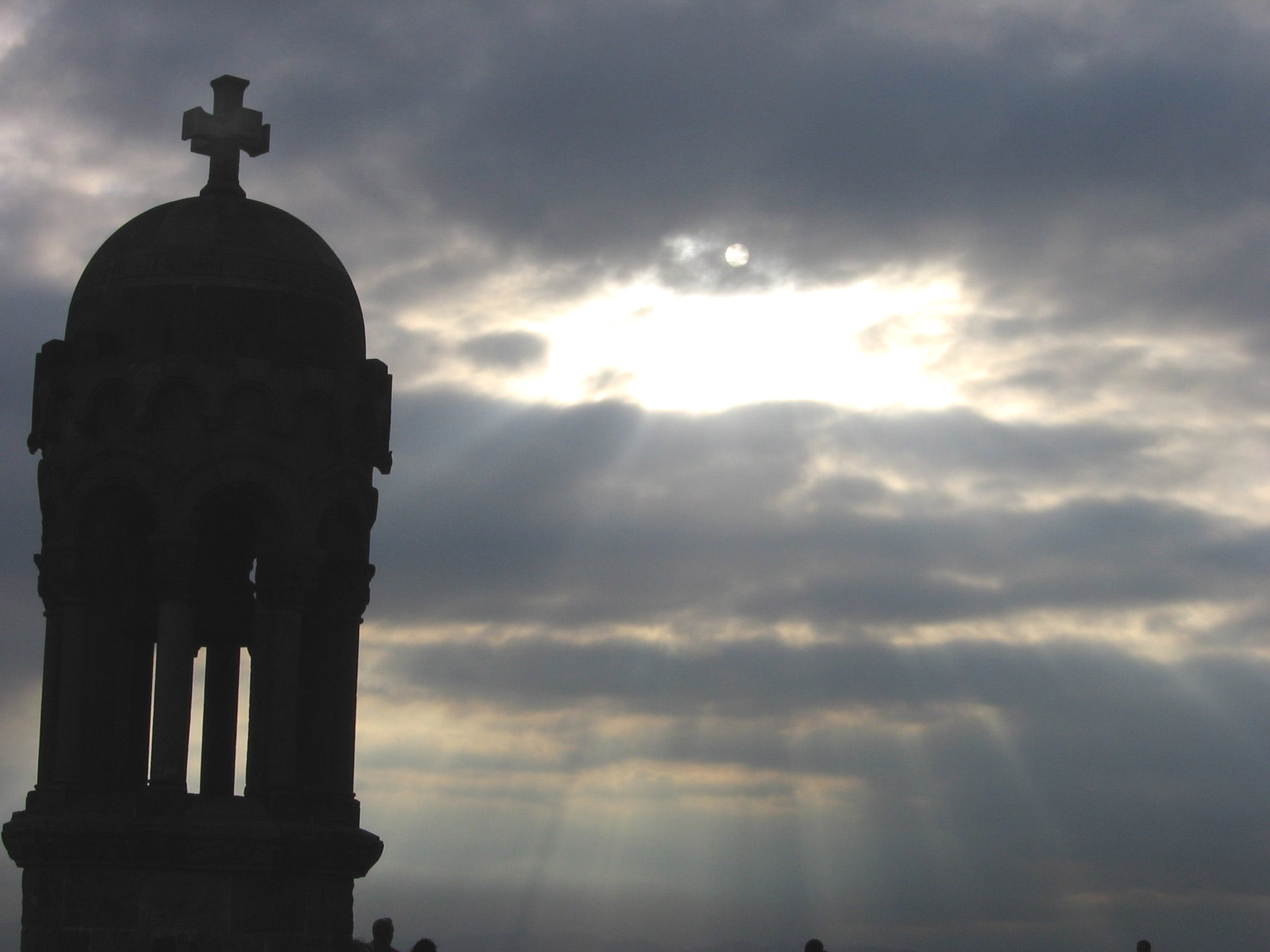 Detalle del Templo Expiatorio del Sagrado Corazón (Tibidabo, España), con cielo crepuscular.